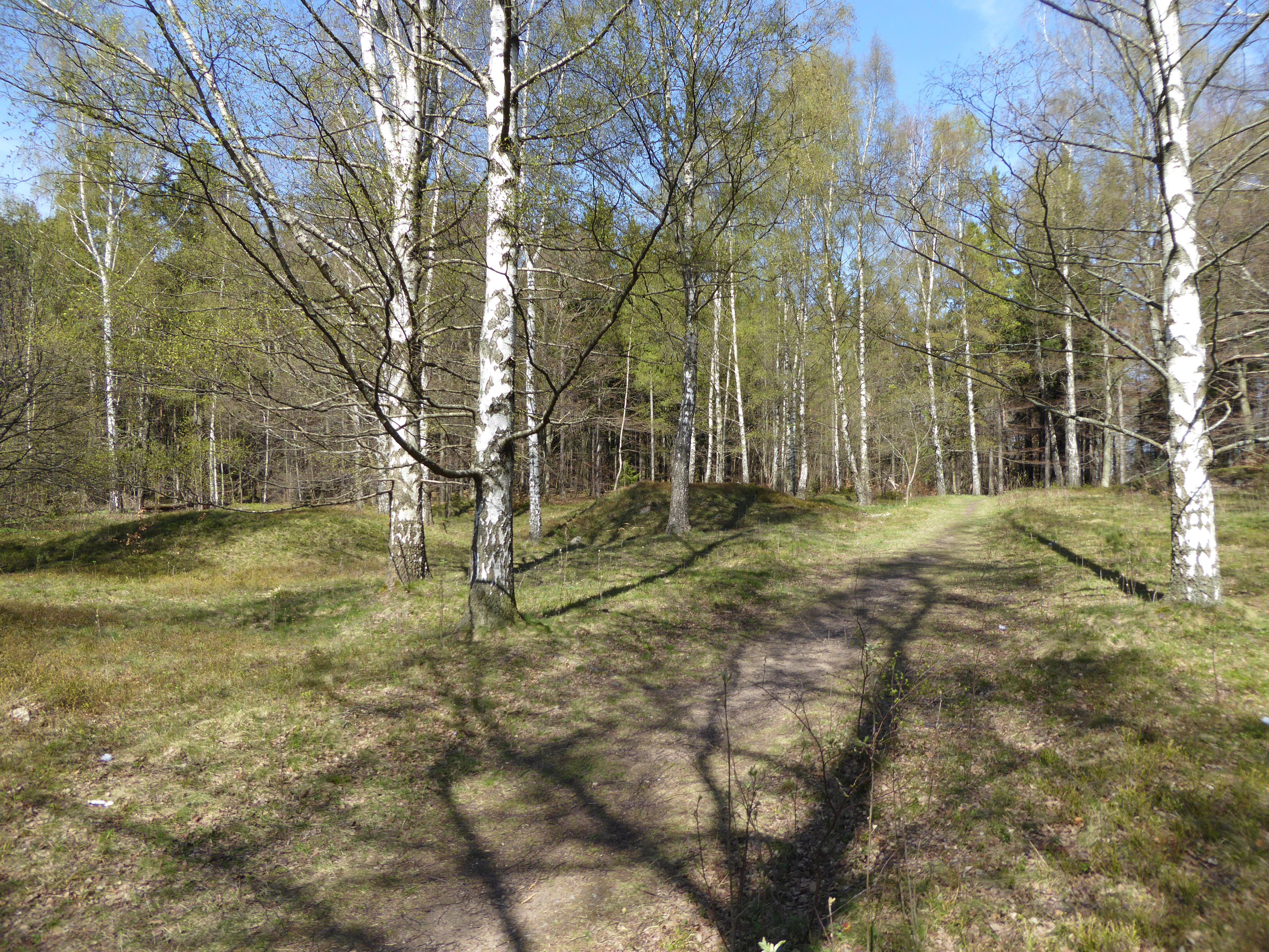 Mellanjärvsgravfältet, RAÄ-nummer Solna 18:1